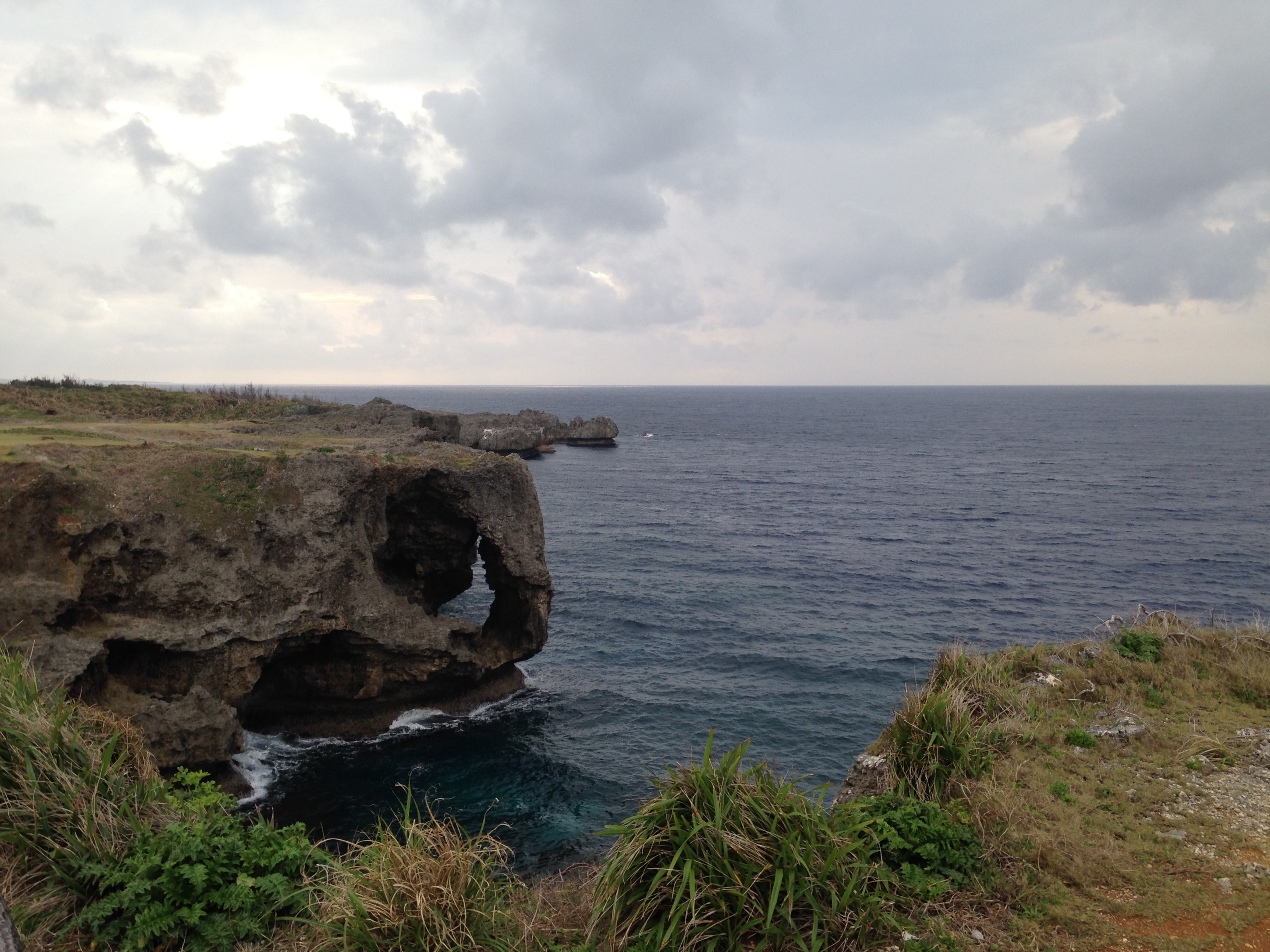 3月の万座毛